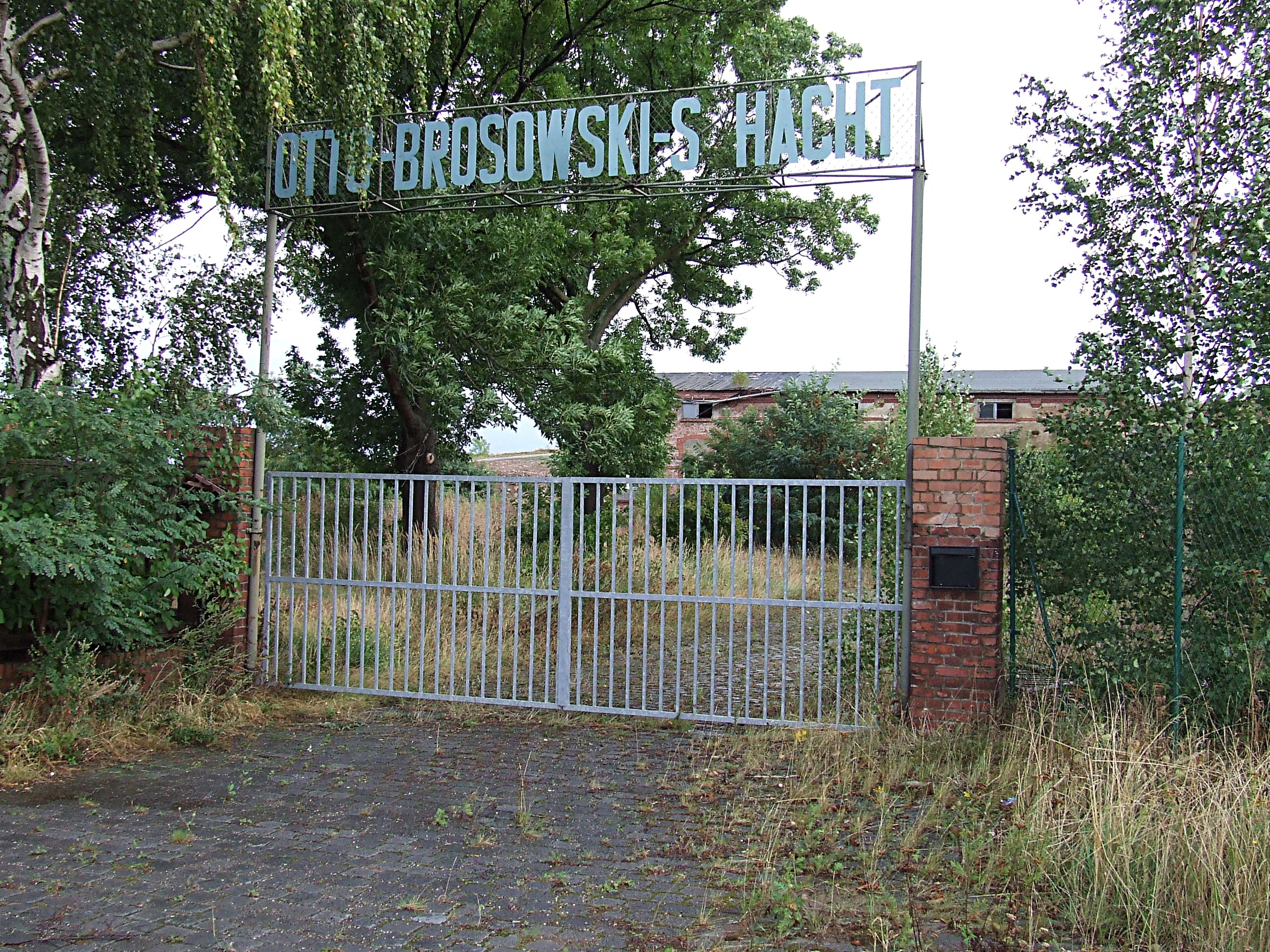 Werkstor vom Otto-Brosowski Schacht (ehem. Paul-Schacht) bei Augsdorf